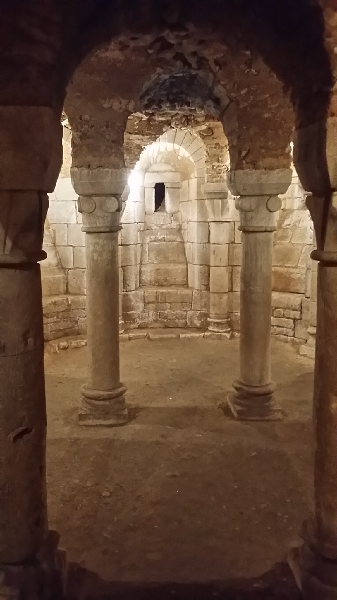 Crypte du 11° siècle de l'église Notre Dame de la ville de Fontenay Le Comte en Vendée.